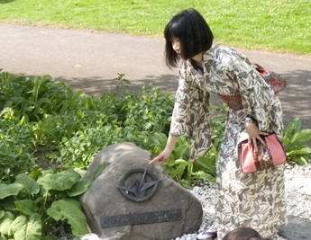 Die Künstlerin Yoshie Shibahara erklärt auf der interkulturellen Wanderung wieso der Origami-Kranich auf dem Anti Atom Denkmal des Kölner Bündnisses gegen Atomkraft abgebildet ist. Text auf dem Denkmal lautet: Atomwaffen abschaffenThis is a photograph of an architectural monument.